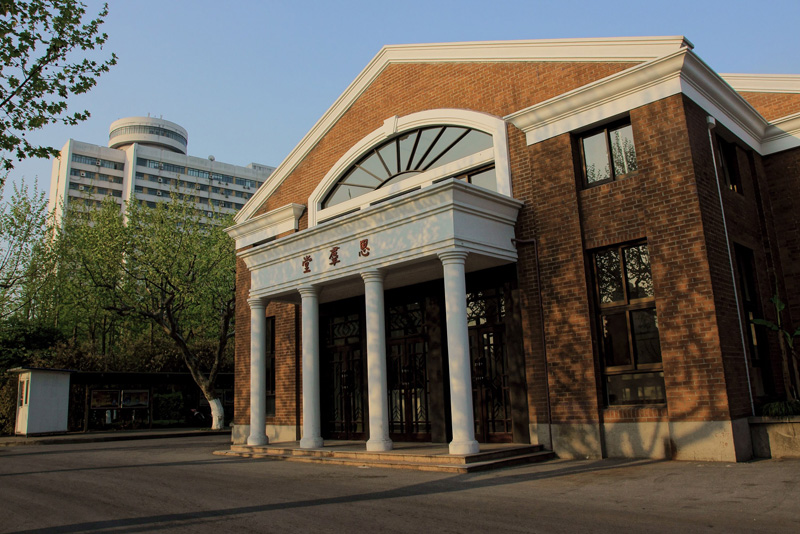 华东师范大学大礼堂——思群堂